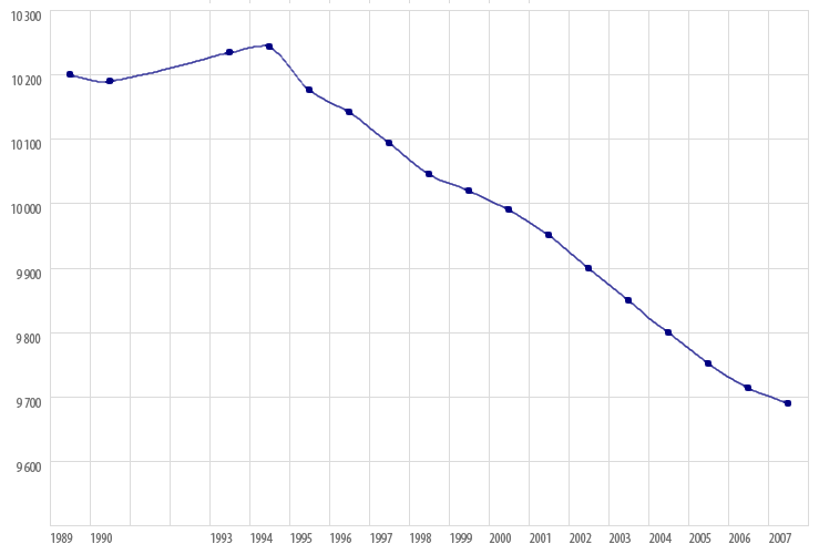 Беларуская (тарашкевіца): Дэмаграфічная статыстыка Беларусі. З 1989 па 2007 год.